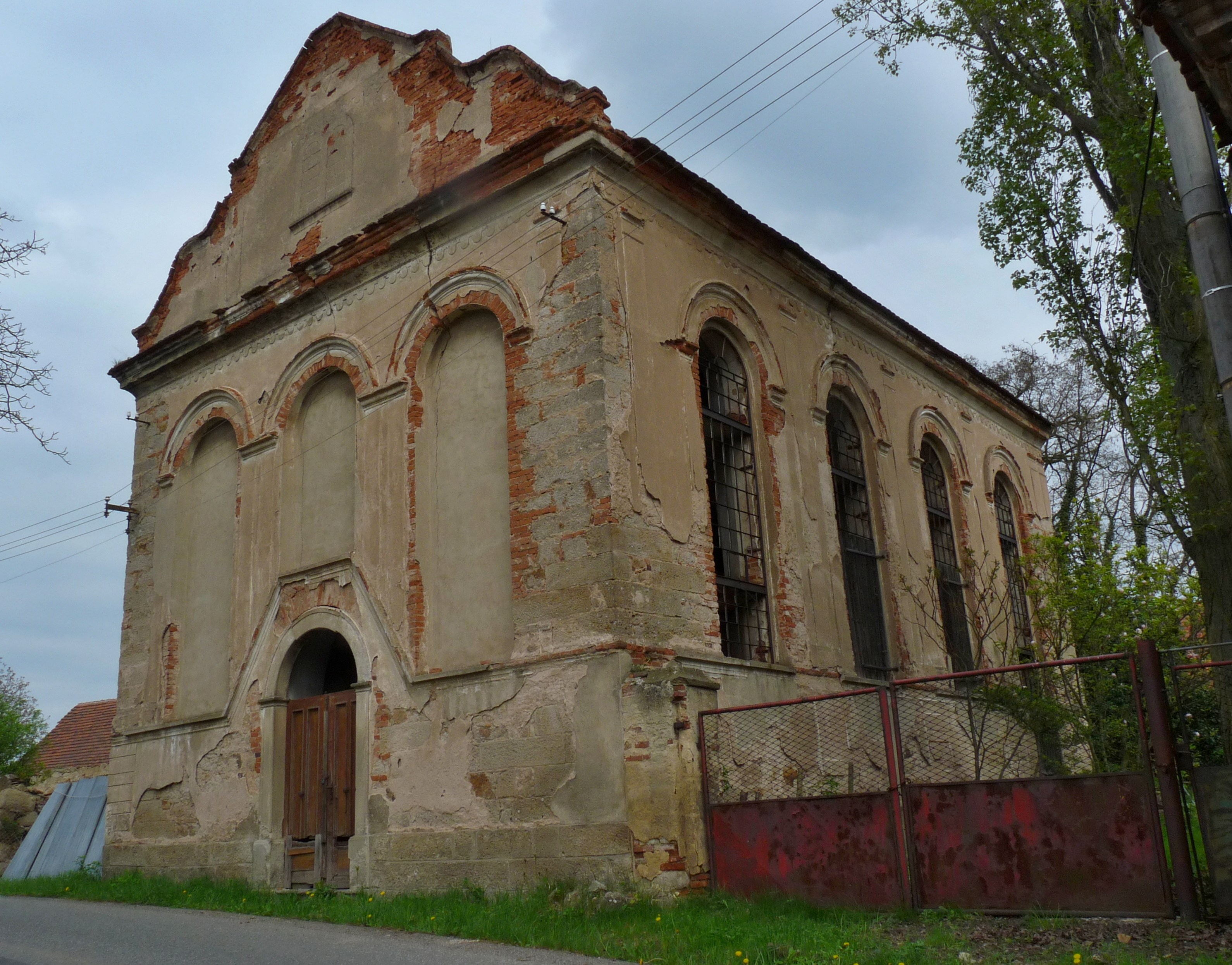 Synagoga, Zderaz